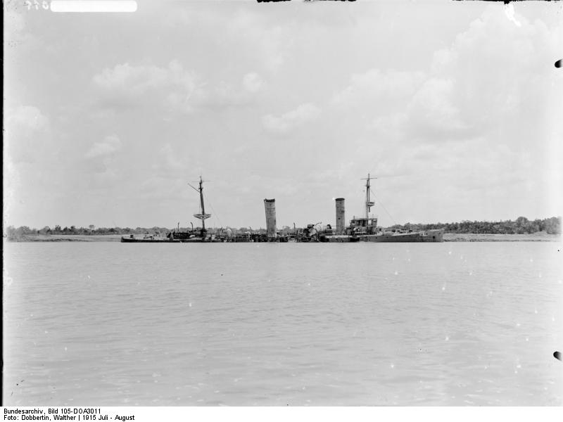 Kreuzer Königsberg zerschossen Information added by Wikimedia users.